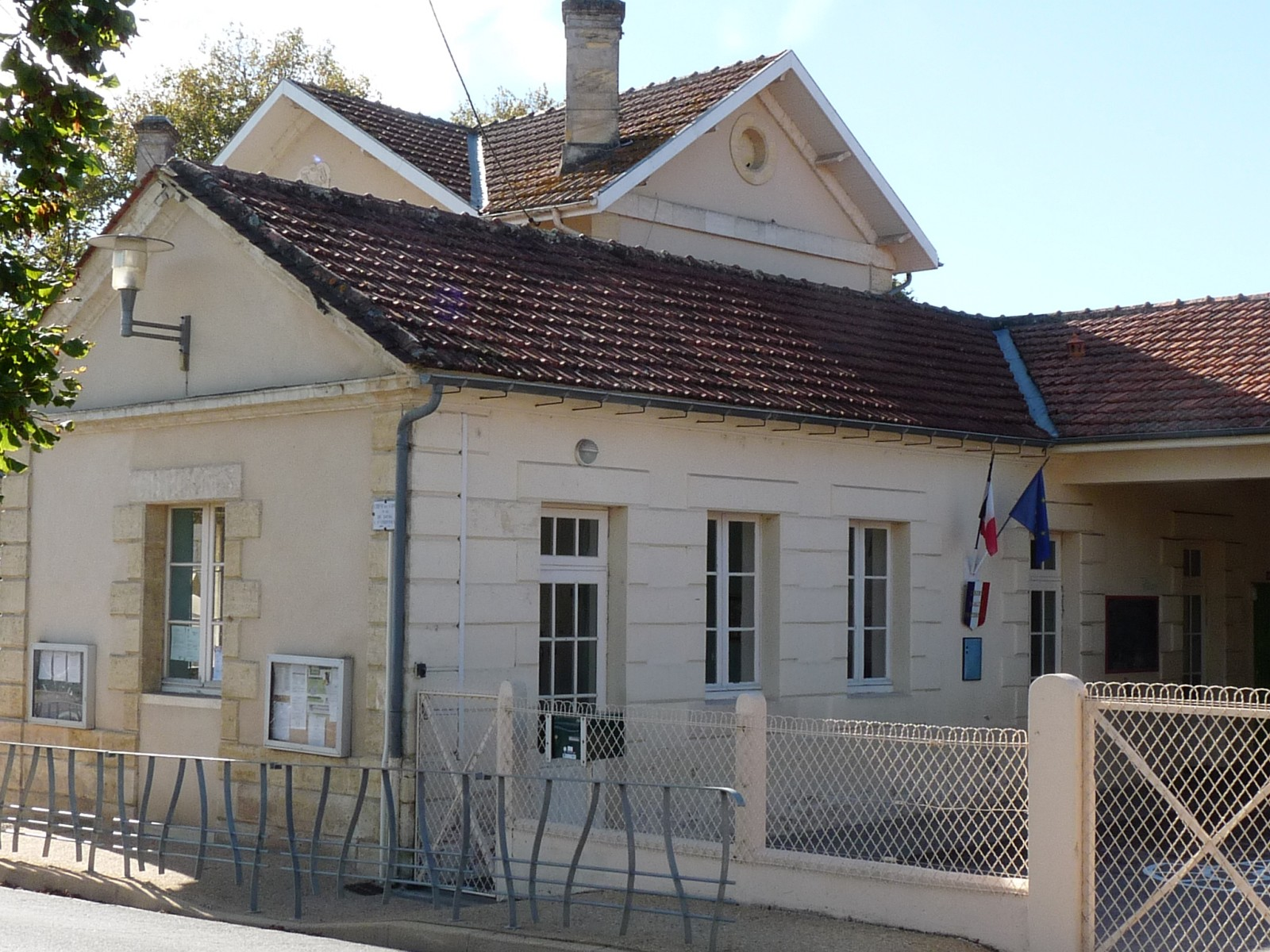 Ecole, Teuillac, Gironde, France